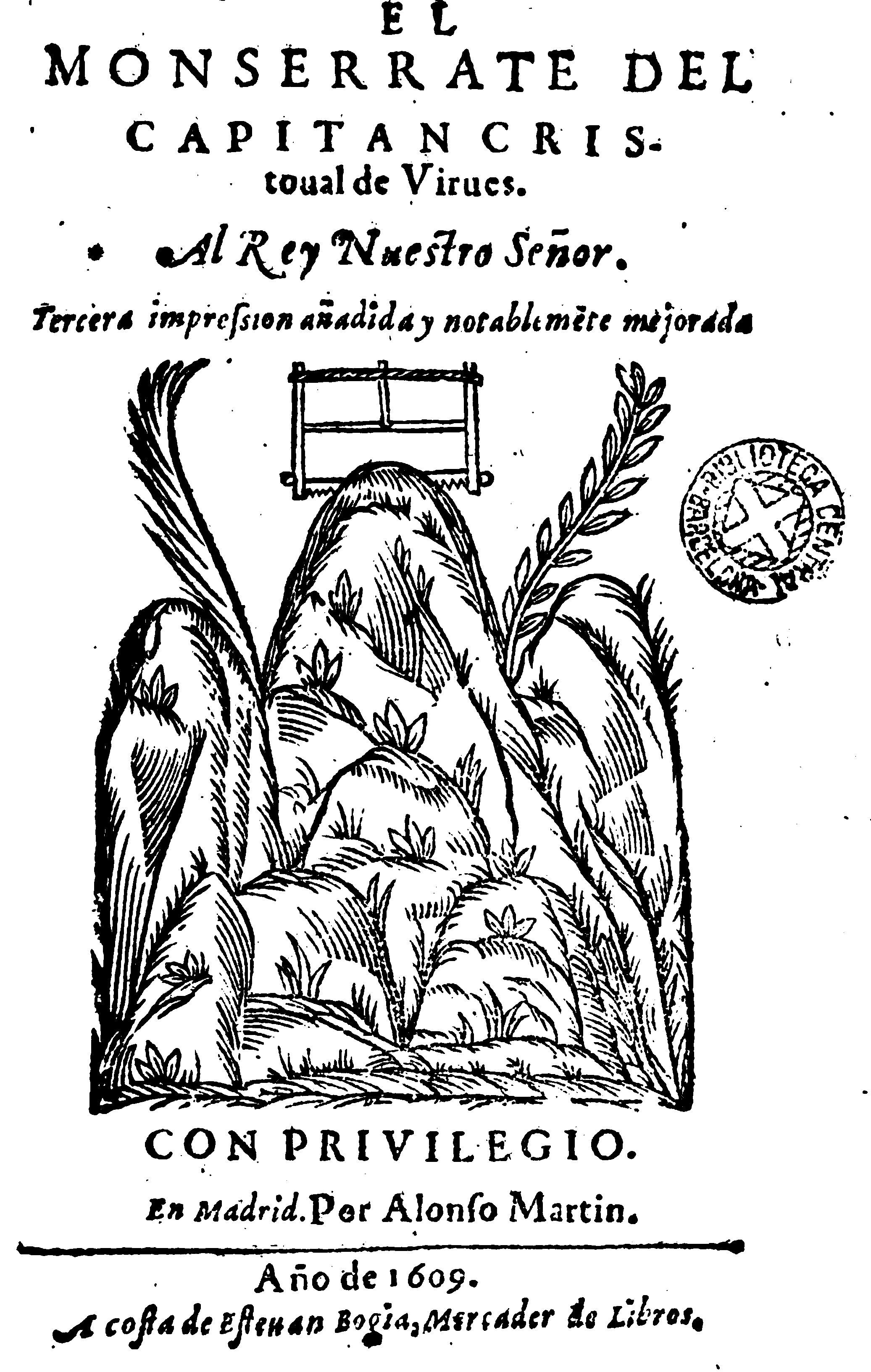 El Monserrate segundo, edicion de Cristobal Virues, 1602, lo Montserrat